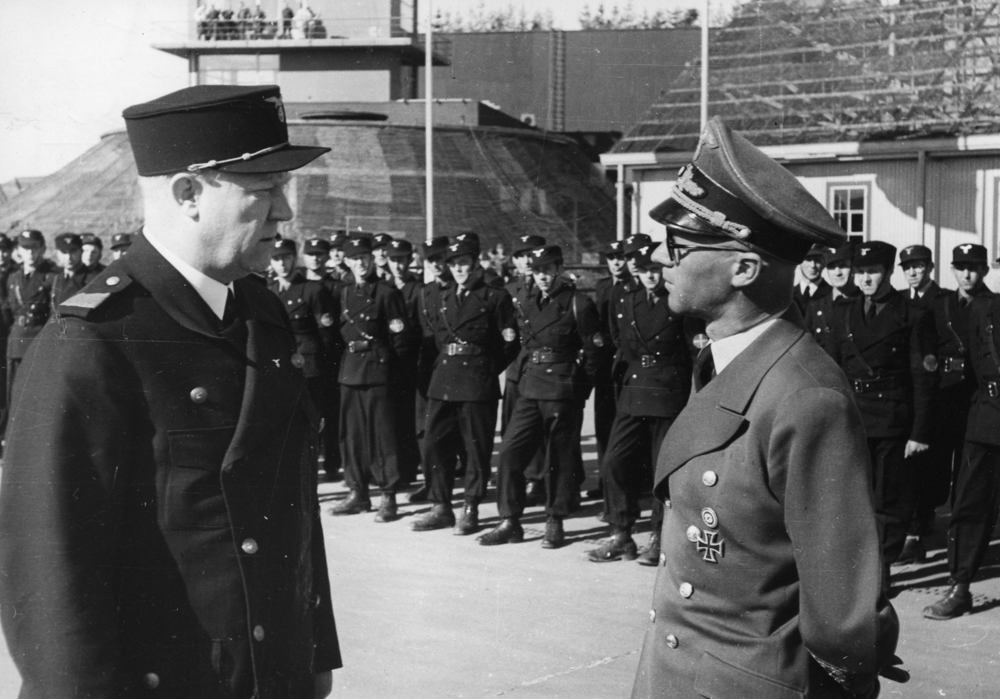 Vidkun Quisling og Josef Terboven inspiserer en avdeling av hirden.